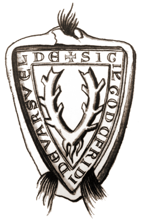 Wappen des Gottfried von Vorsfelde, erstmals 1217 erwähnt